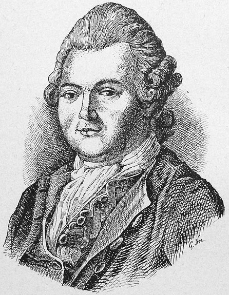 Philippe-Etienne Lafosse